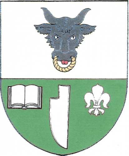 znak, Sejřek, okres Žďár nad Sázavou